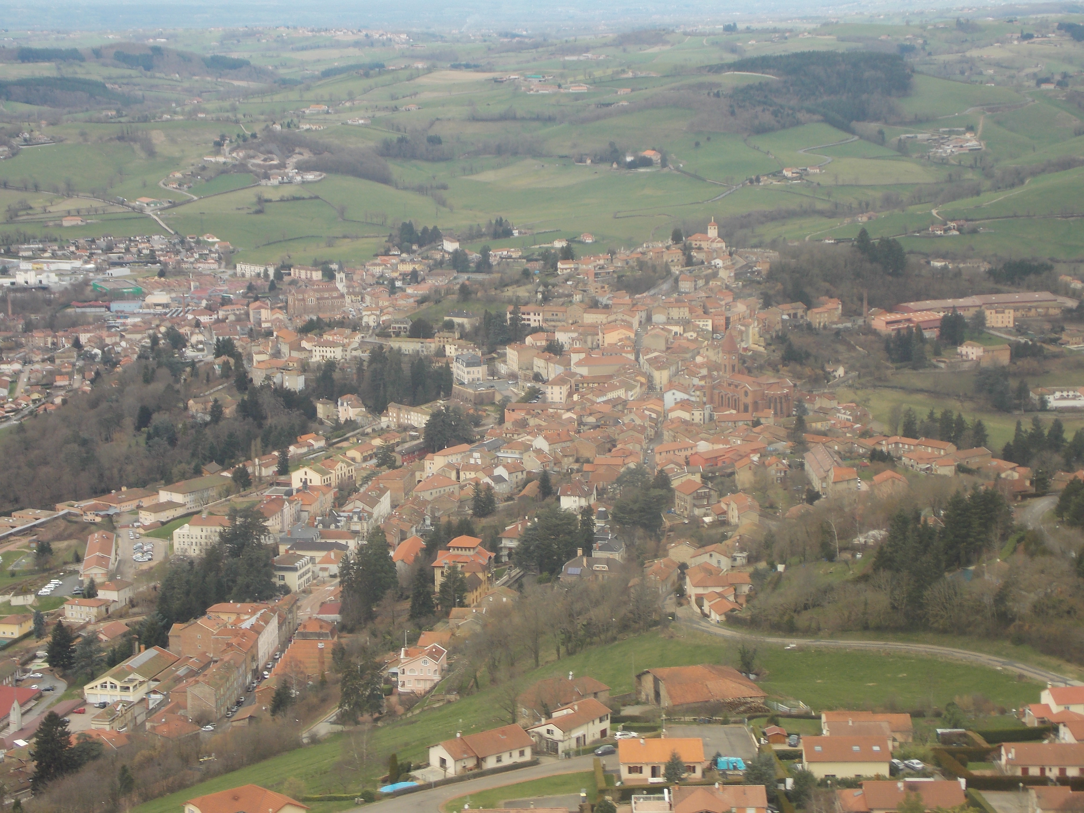 Vue partielle de Thizy-les-Bourgs (Rhône, Rhône-Alpes, France).